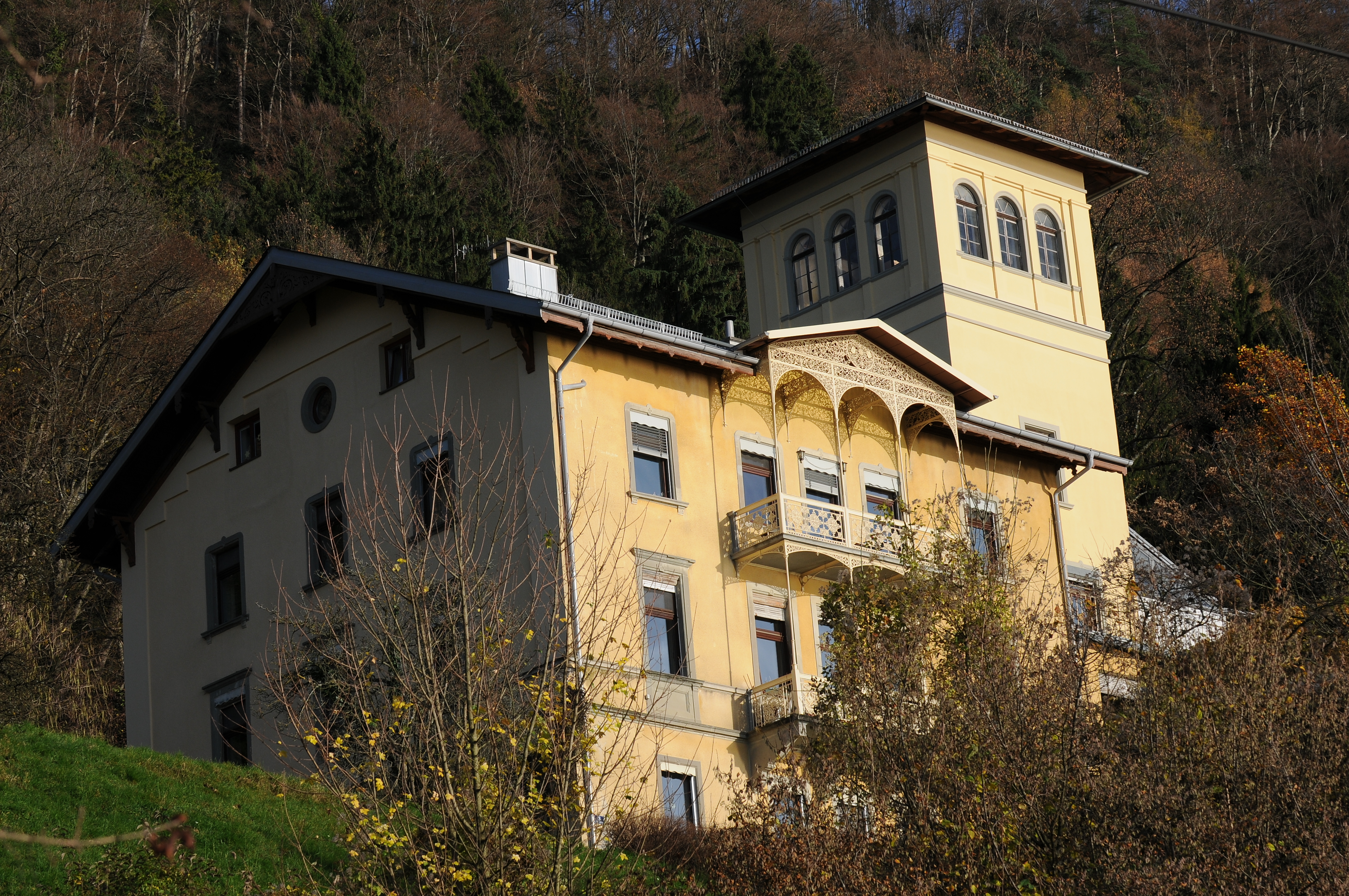 Villa Gravenreuth in Lochau (Vorarlberg), Klausberg 3. 1869/1870 errichtete Max Graf von Gravenreuth, der Besitzer der vorgelagerten Burg Klausturm die Villa Gravenreuth mit einer Hauskapelle.